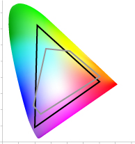 CIE-Lab: RGB und CMYK